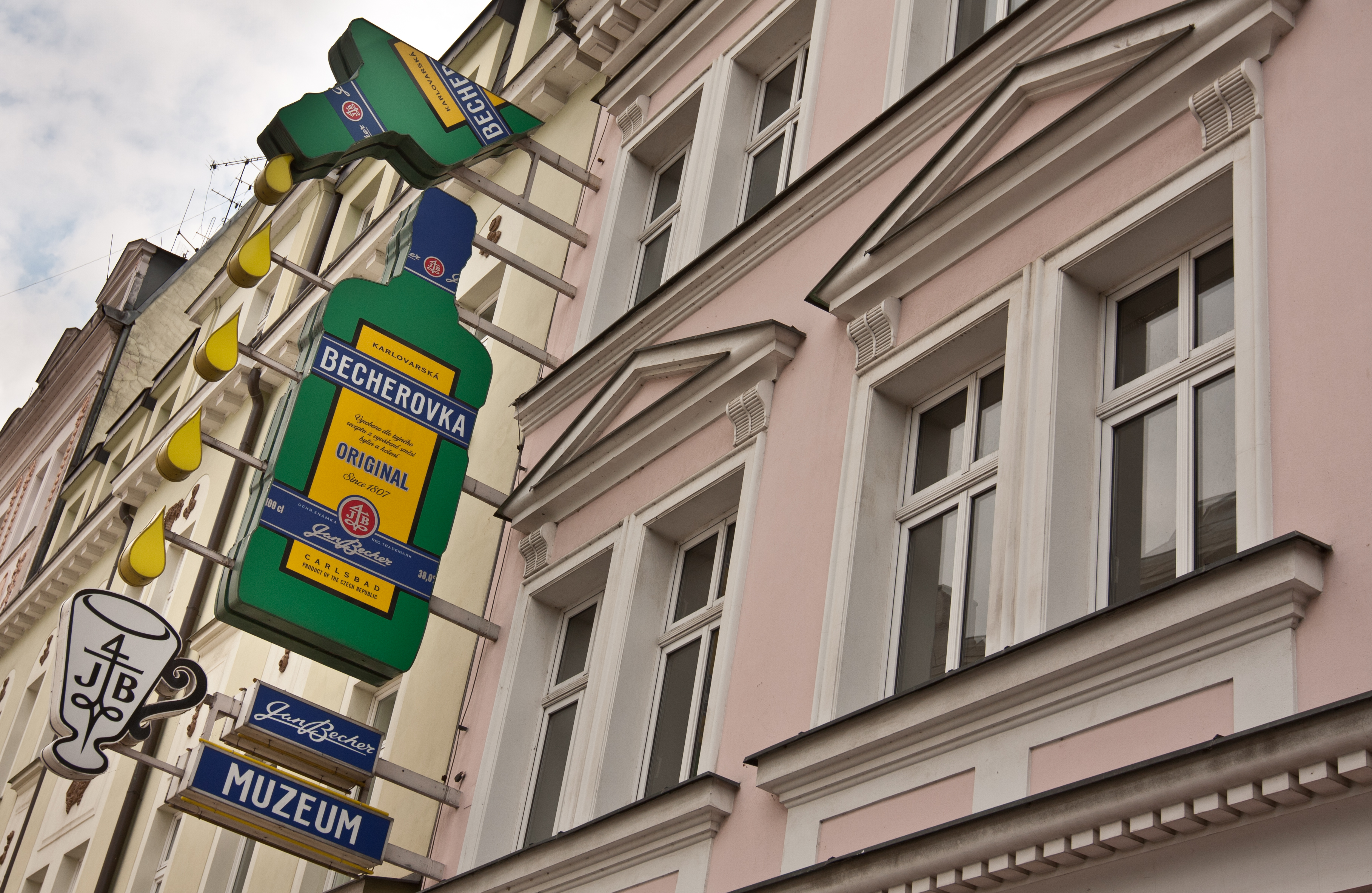 Jan Becher Muzeum